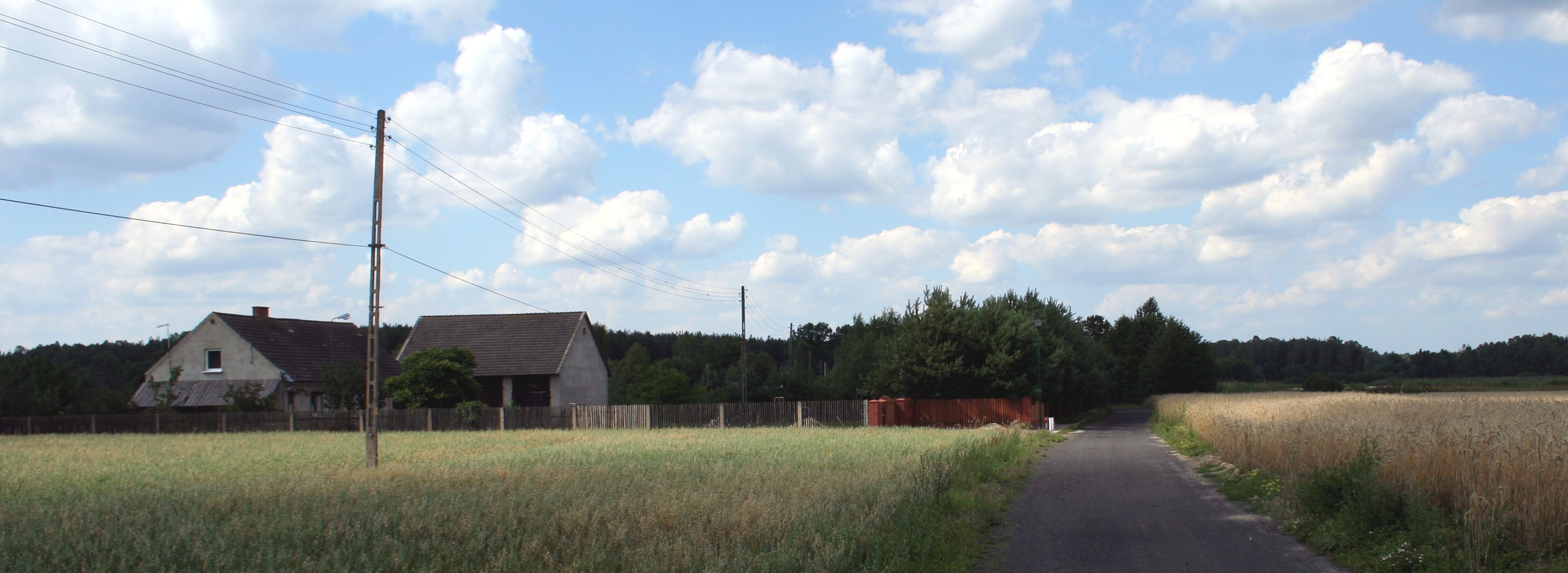 Piłka - fragment miejscowości, gmina Herby, powiat lubliniecki